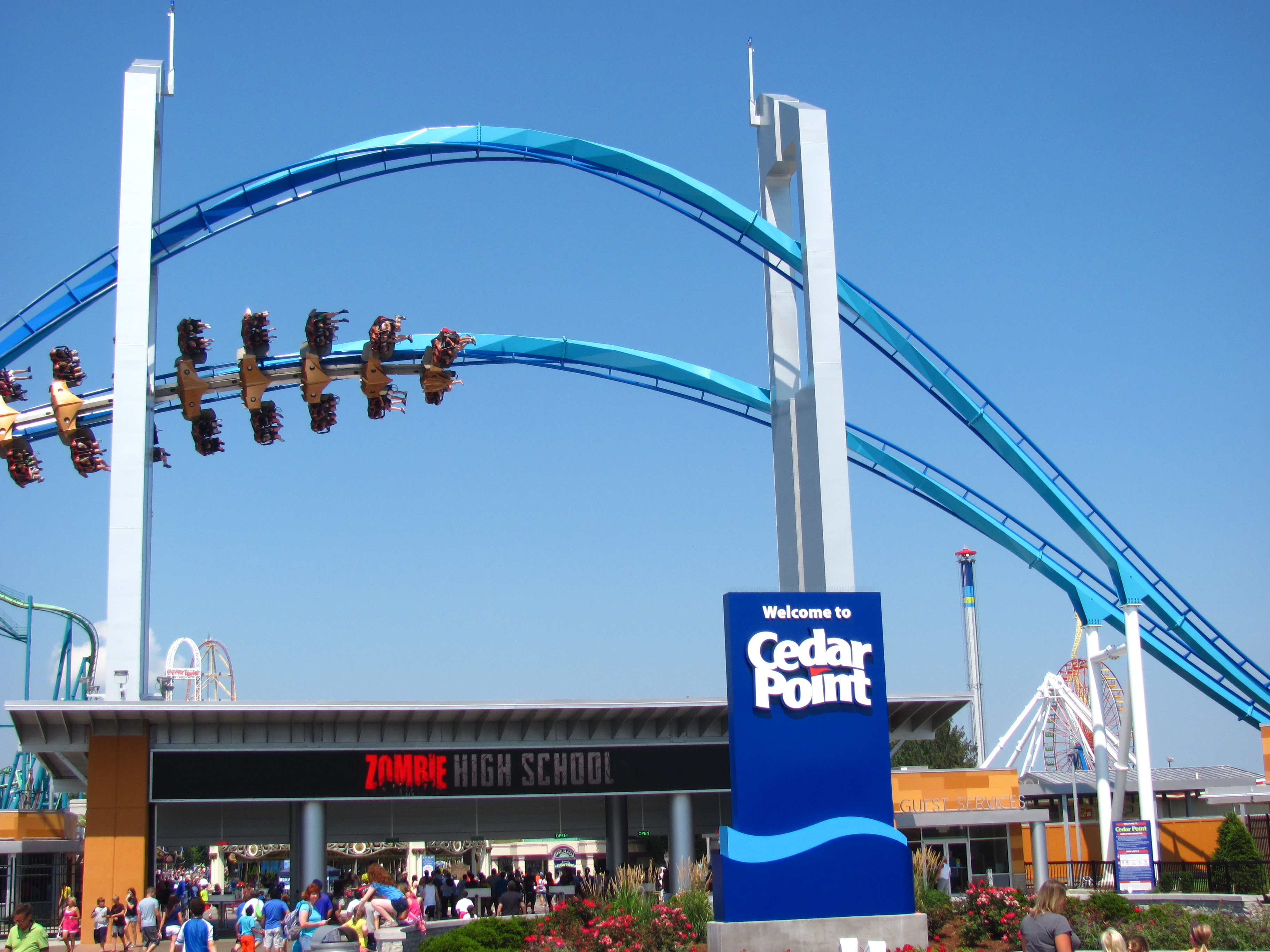 Cedar Point 007